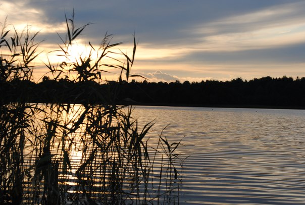 Возера на захадзе